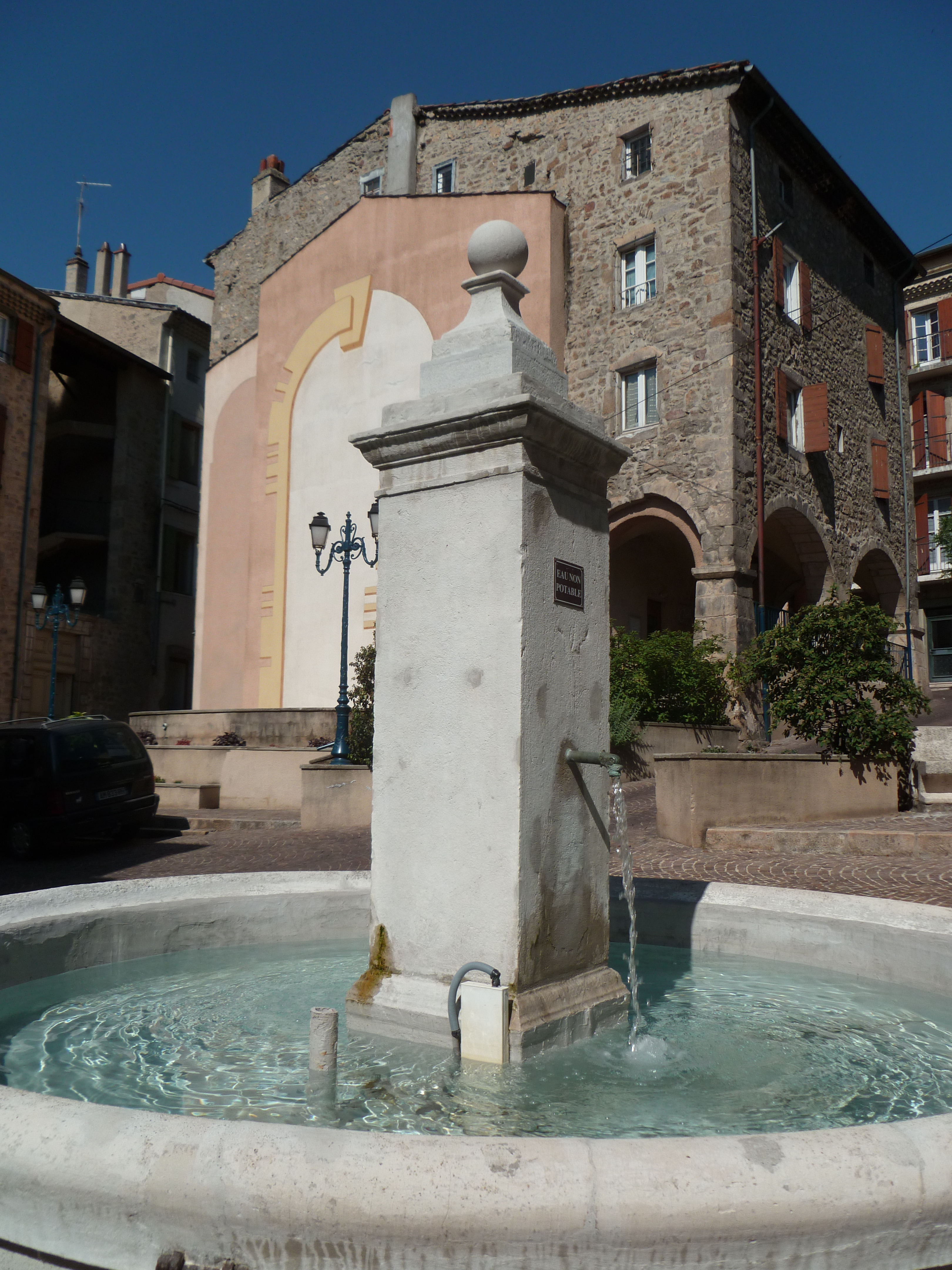 Annonay, place Grenette et sa fontaine datant de 1726.